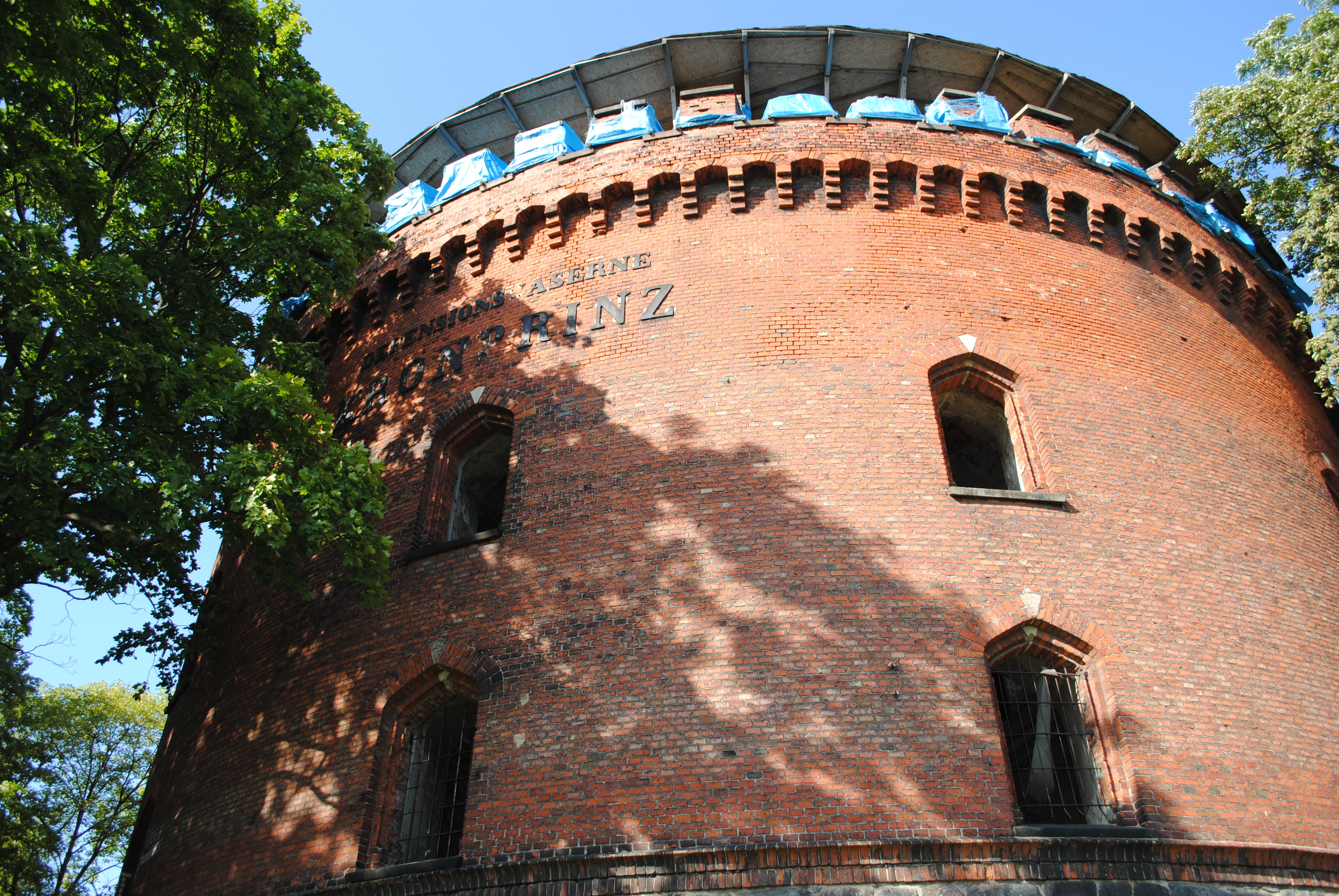 Крепость Фридриха Великого (казарма «Кронпринц») (Калиниградская область, Калининград, Литовский вал., 38)